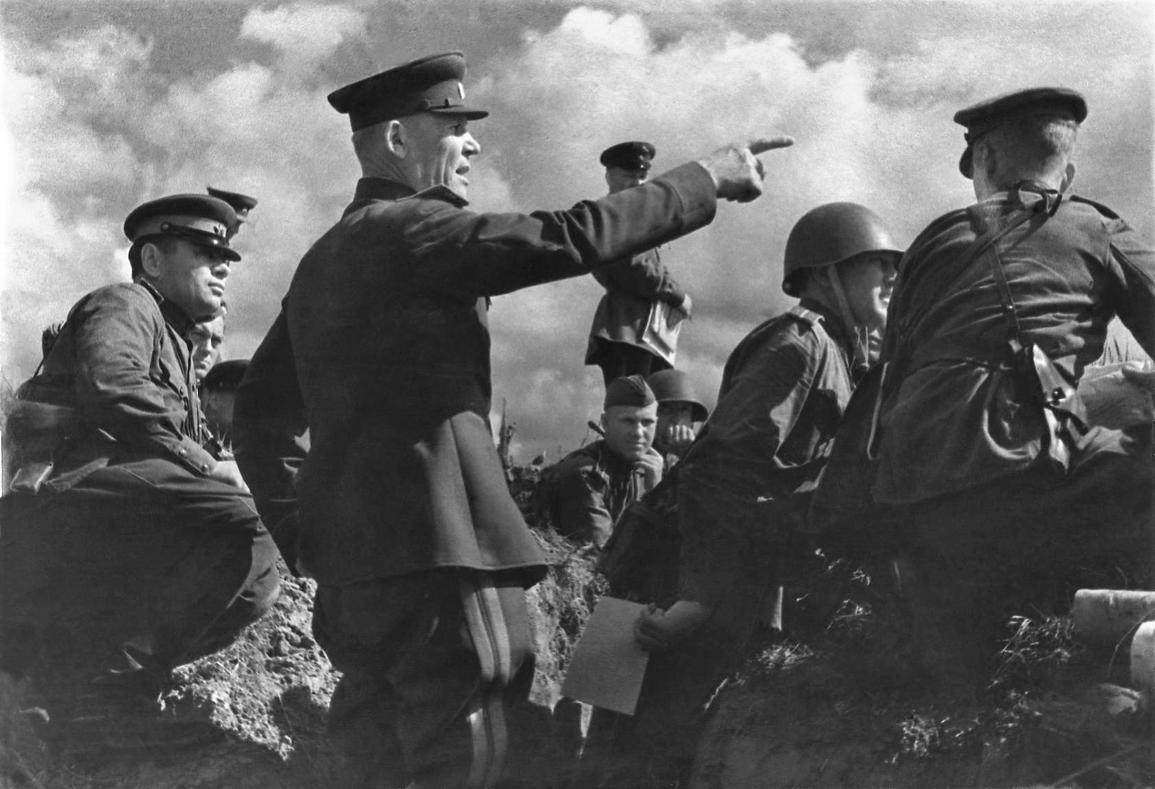 Командующий Степным фронтом генерал-полковник И.С. Конев во время Белгородско-Харьковской операции